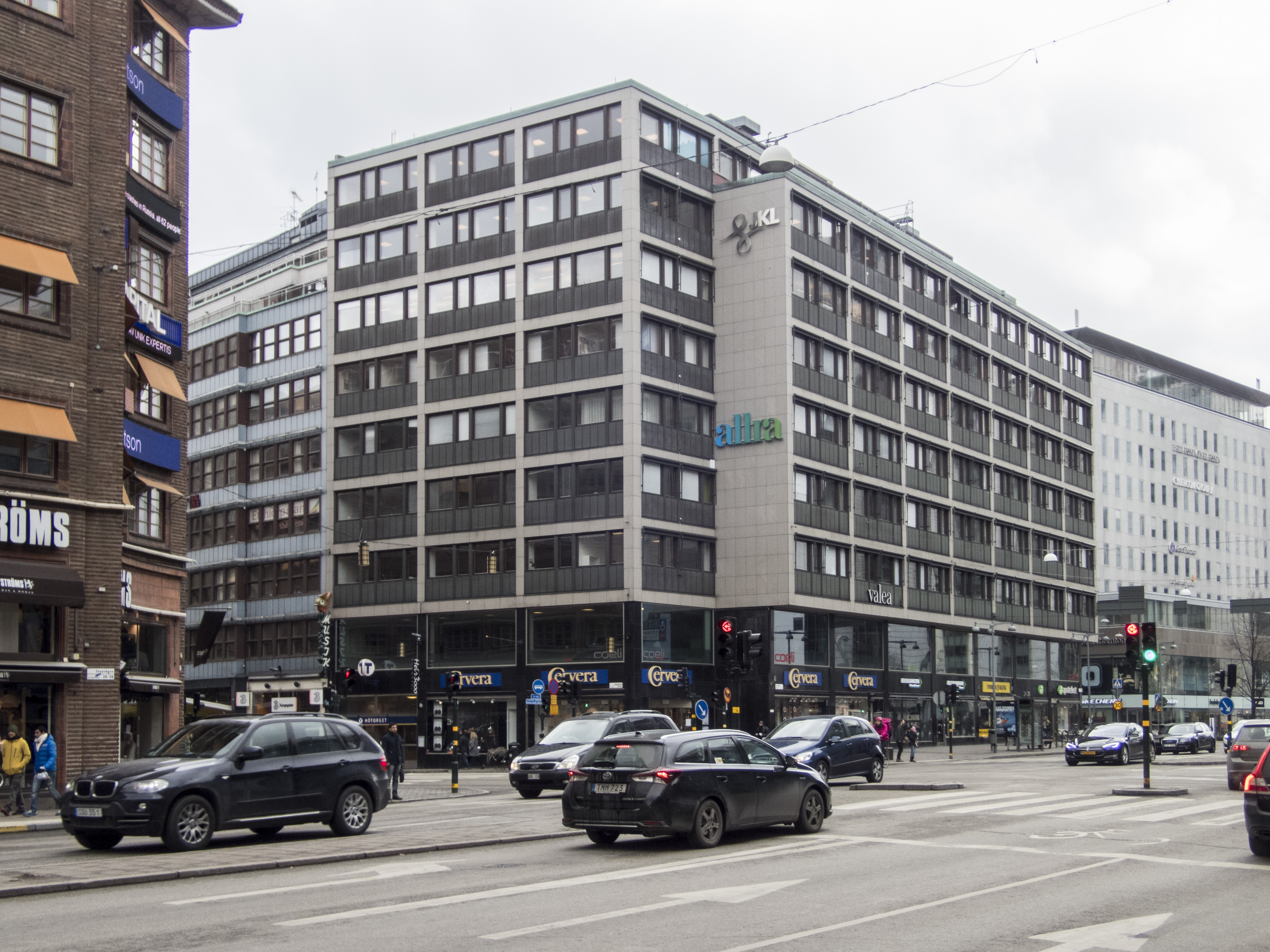 Järnplåten 28, Kungsgatan 39, Sveavägen 24 Stockholm Nybyggnadsår 1956 - 1959 Fastighets AB Hufvudstaden (Byggherre) Hack Kampmann (Arkitekt) S. Jansson (Byggmästare)